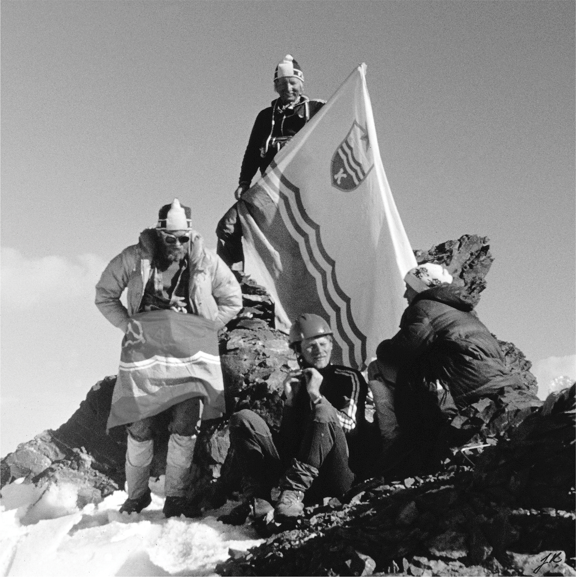 Tallinna tipp 6047 m